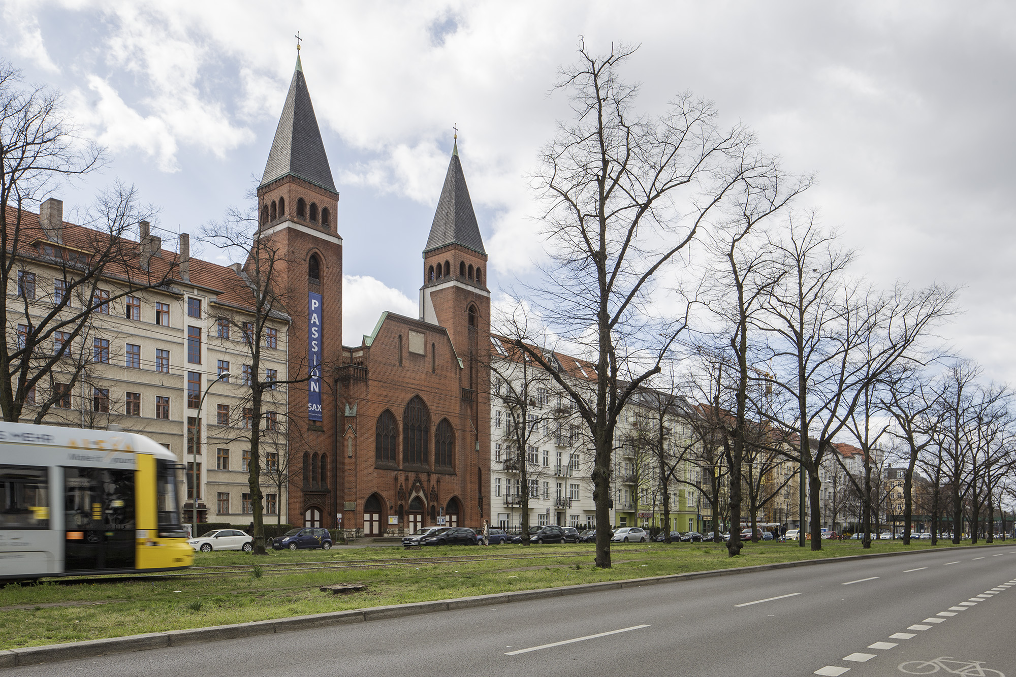 Paul-Gerhardt-Kirche, Berlin-Prenzlauer Berg, Wisbyer Straße 7